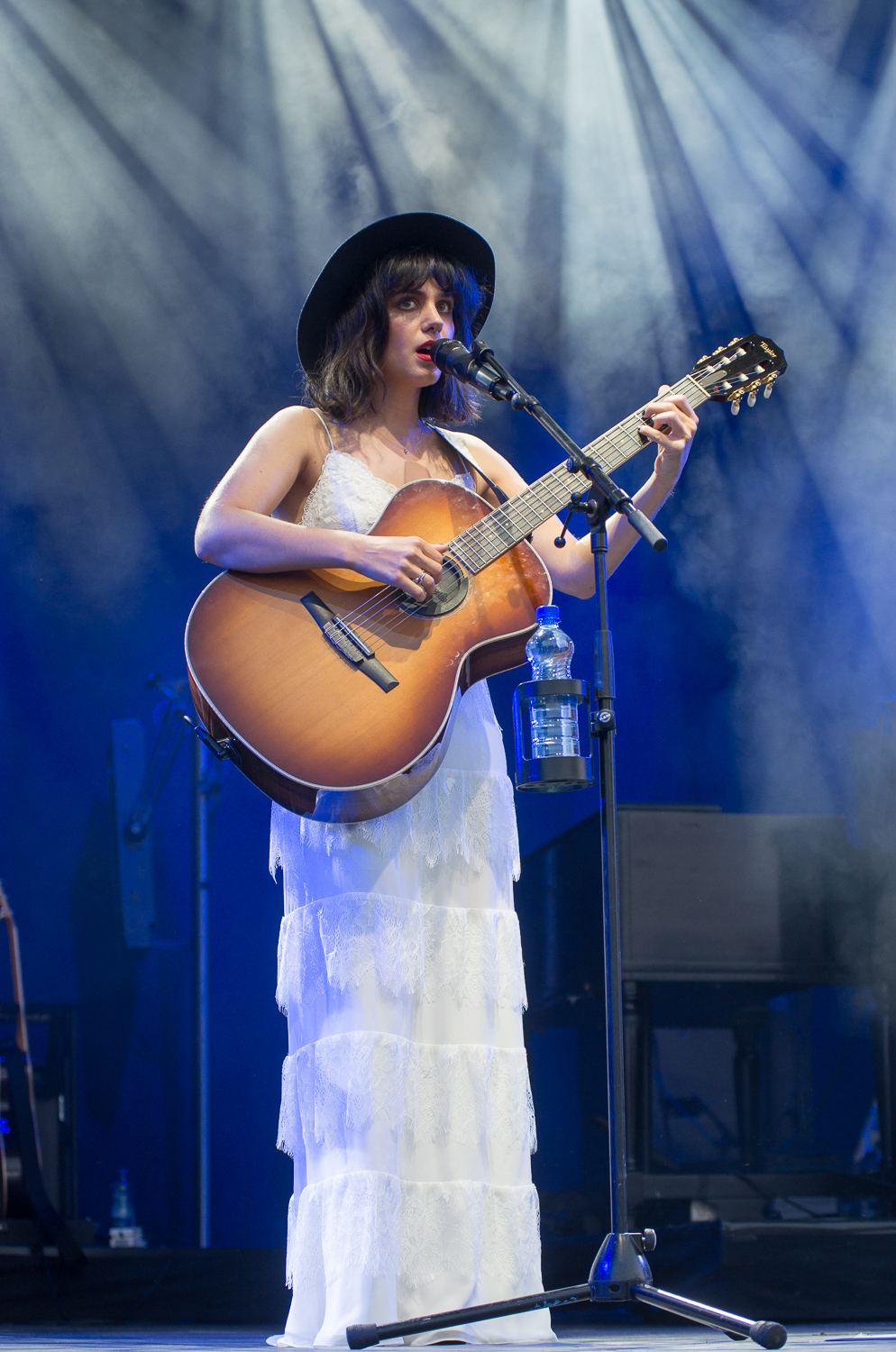 Katie Melua am Stars Of Sound 2015